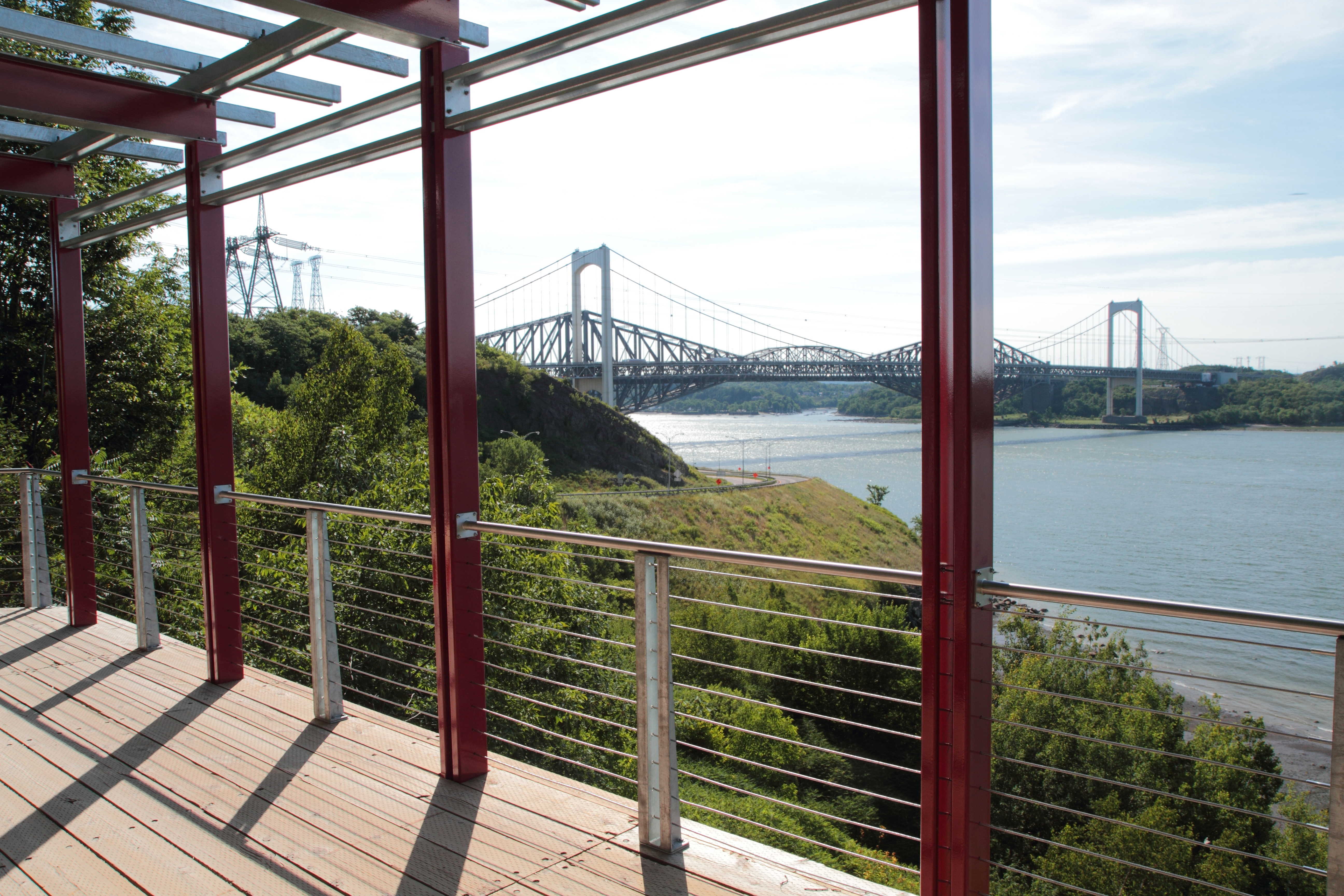 "Les Ponts", Sentier des Grèves, Québec, Canada